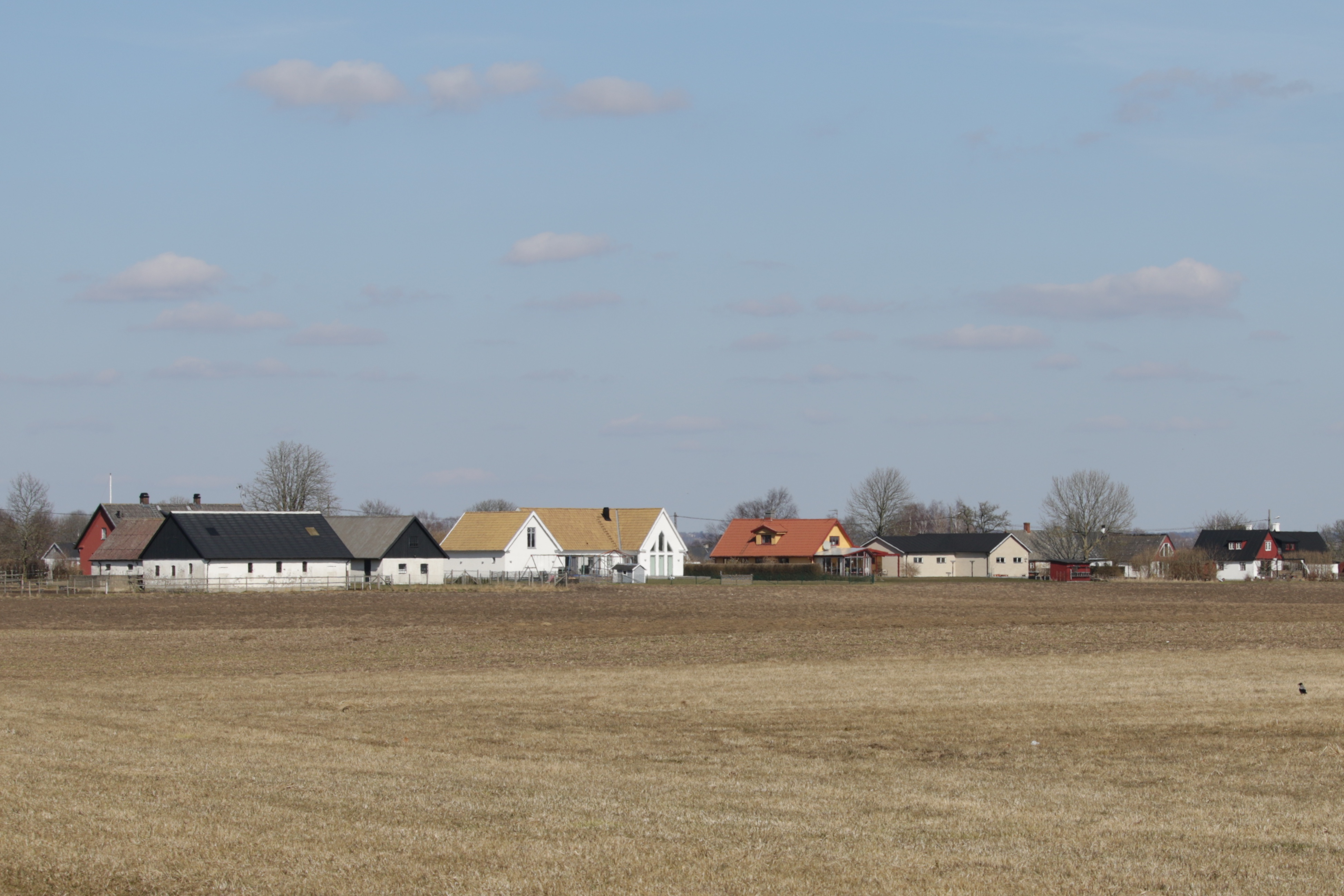 Beden, Staffanstorps kommun